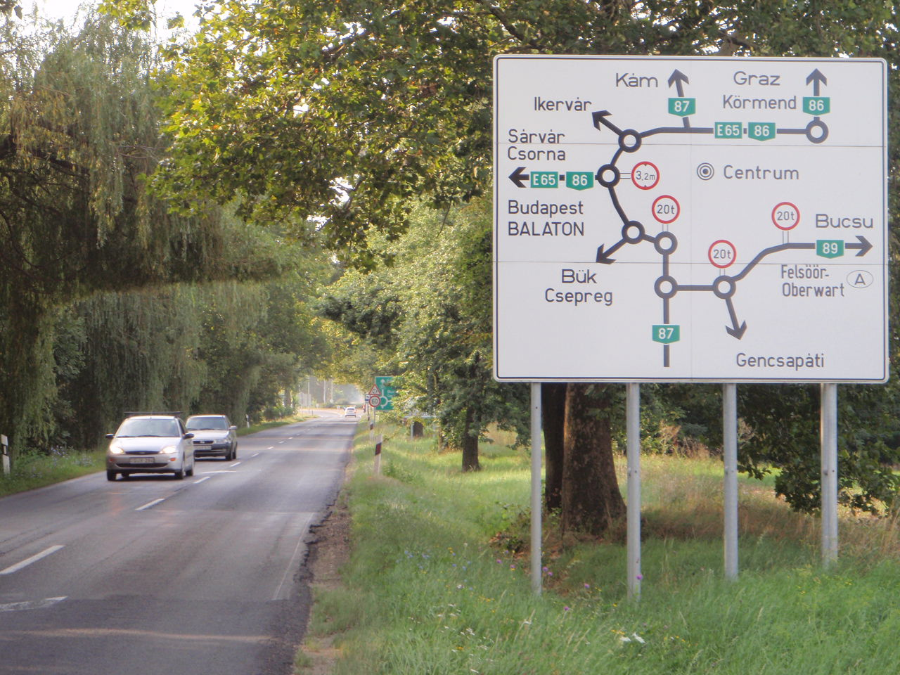 B87 Bundesstrasse, bei Steinamanger, Stadtring